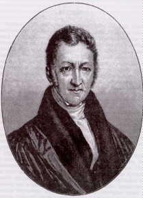 Роберт Томас Мальтус